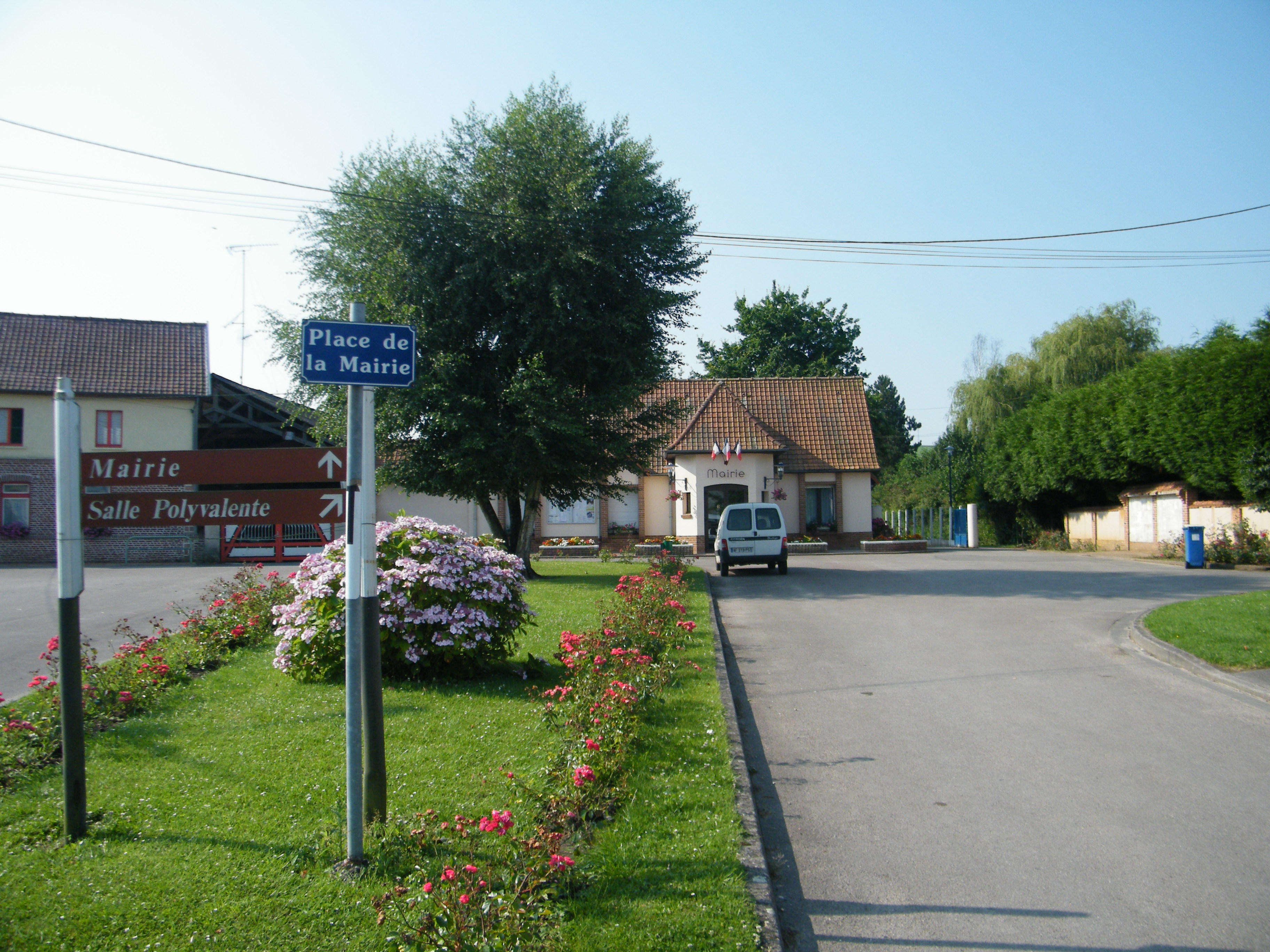 Mairie.